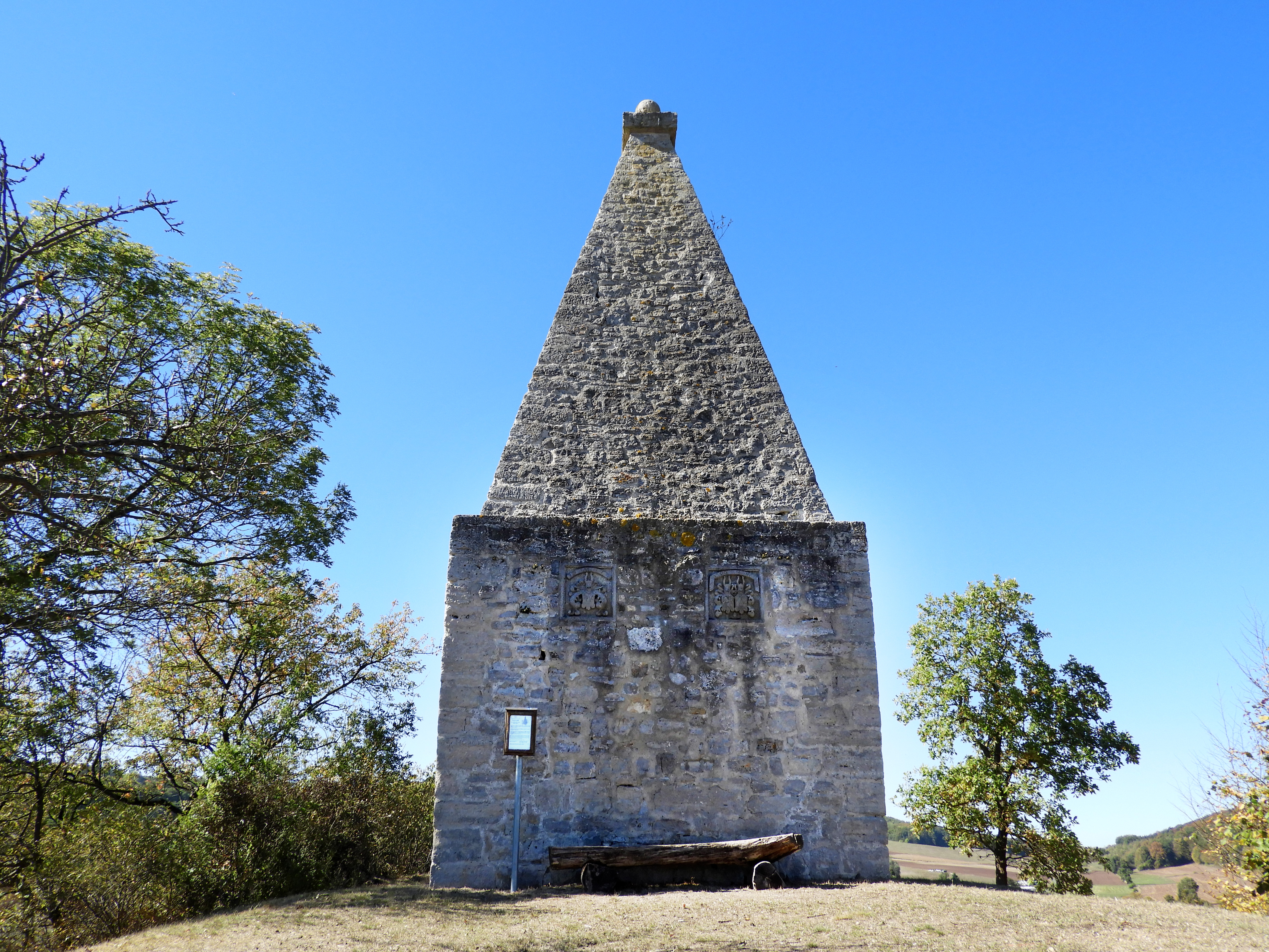 Die Ostseite der Grabpyramide derer „von Capellan“ östlich von Lüderbach auf dem Kirchberg. In der Pyramidengruft wurden Adam Friedrich von Capellan (* 30. Juni 1702; † 25. Juni 1779) und seine verwitwete Schwester Friederica Catherina von Cornberg geb. von Cappellan (* 5. September 1707; † 25. Januar 1776) beigesetzt. Die Grabpyramide ist ein Kulturdenkmal aus künstlerischen, geschichtlichen und städtebaulichen Gründen. Lüderbach ist ein Ortsteil der Gemeinde Ringgau im nordhessischen Werra-Meißner-Kreis.